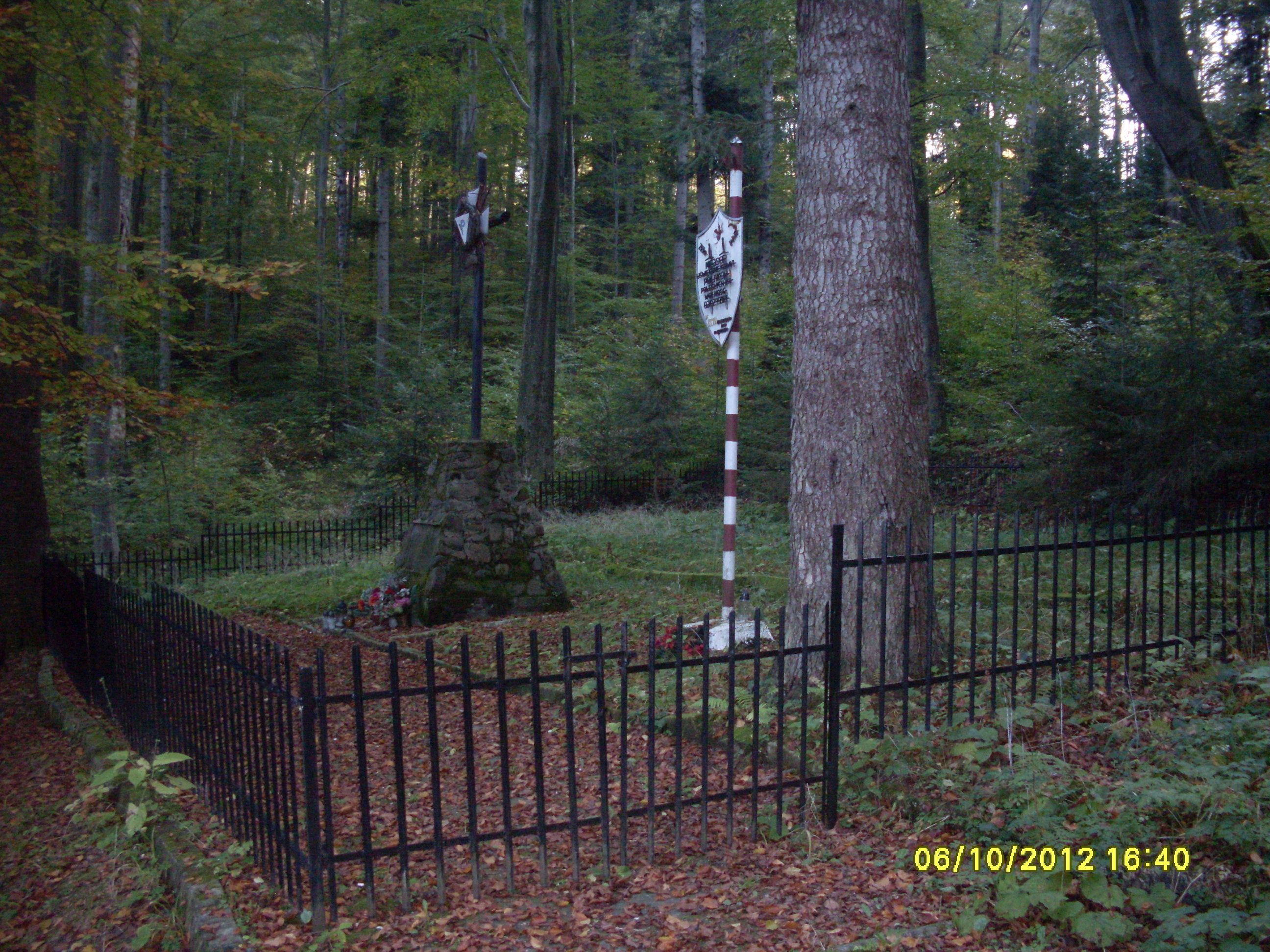 Miejsce rozstrzelania Polaków w 1940 roku przez Niemców. Rozstrzelano tu 112 osób. (góra Gruszka).